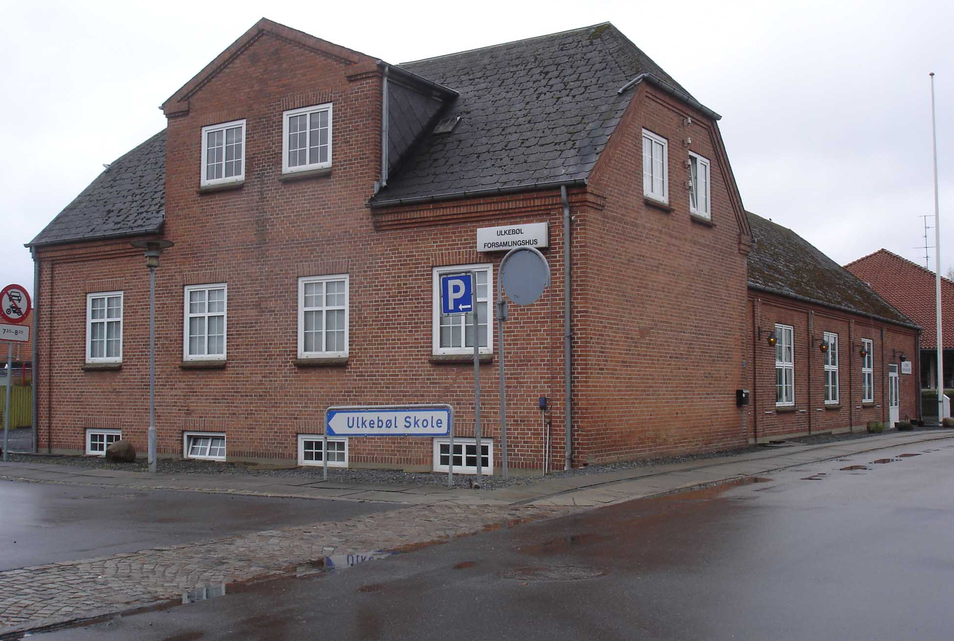 Ulkebøl Forsamlingshus